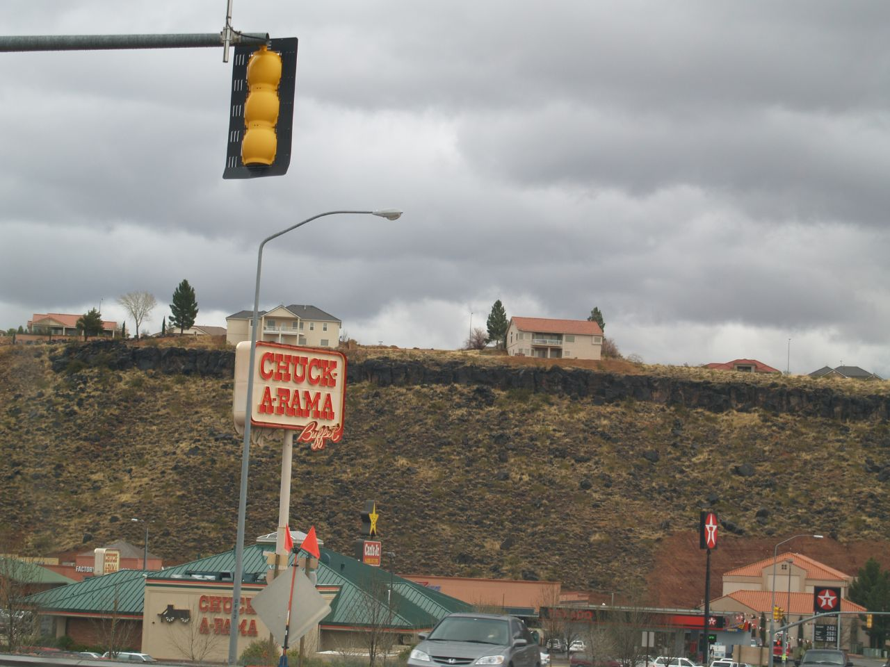 Chuck-A-Rama, St. George, Utah